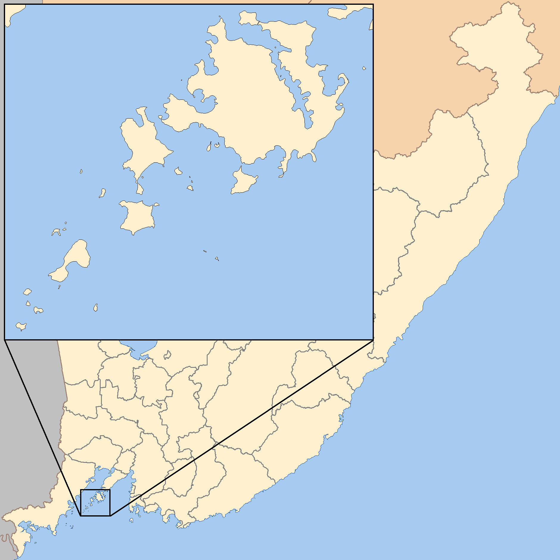 Архипелаг Императрицы Евгении на карте Приморского края